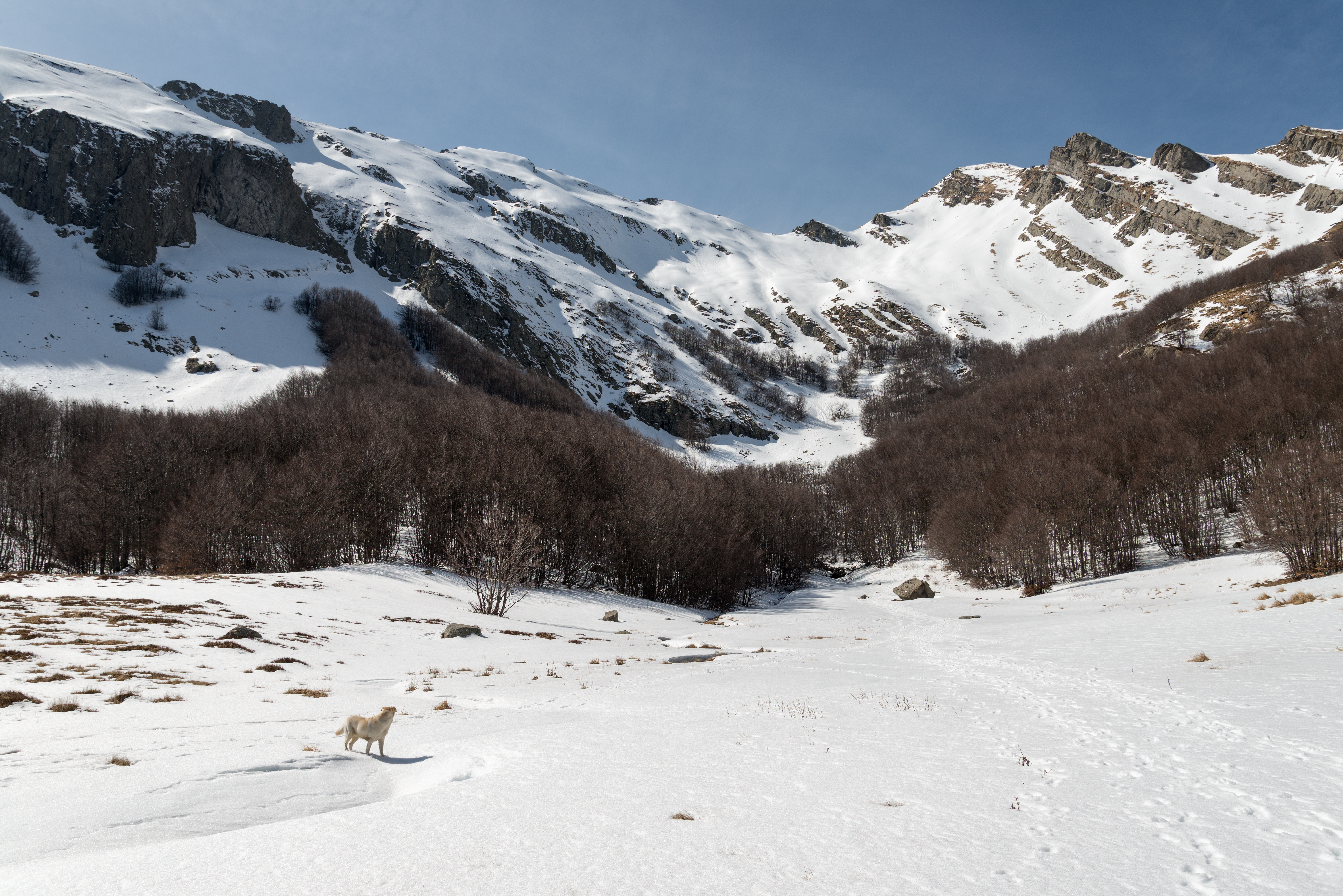 Sorgenti del Secchia, Collagna, Reggio Emilia, Italia